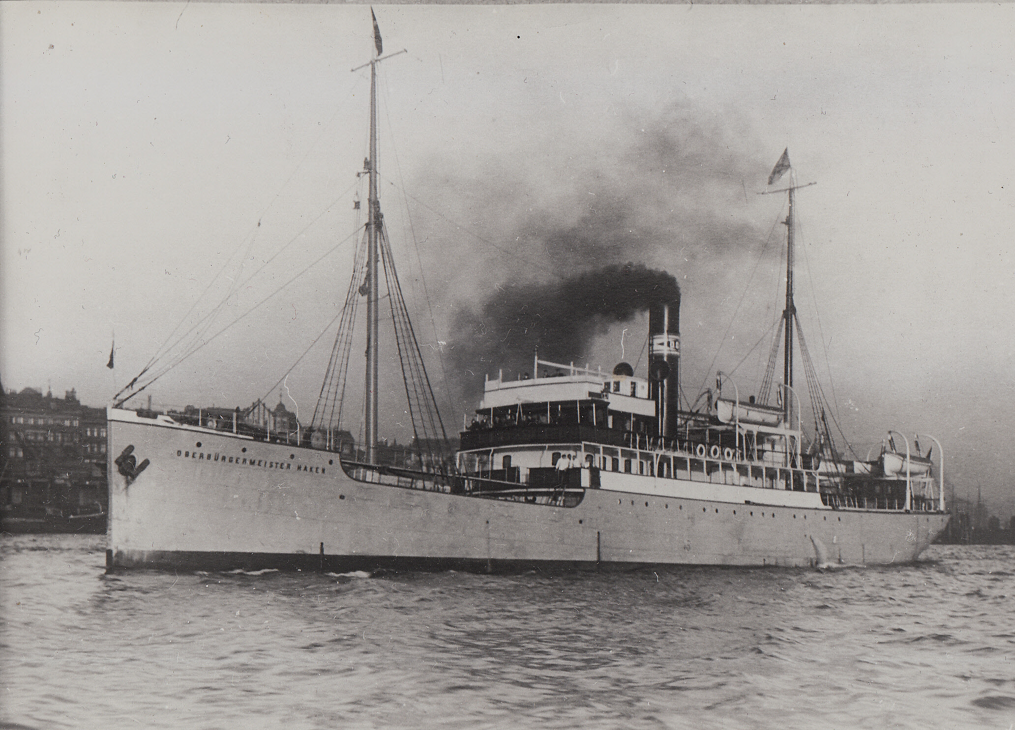 Oberburgermeister Haken, Философский пароход